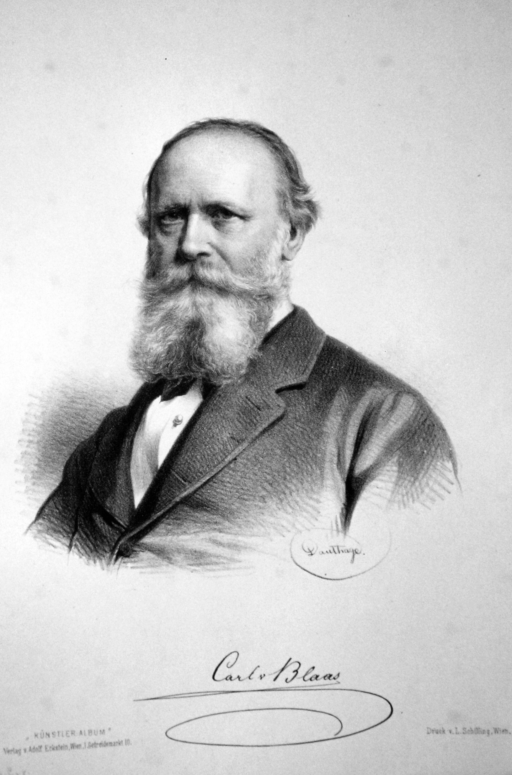 Karl von Blaas (1815-1894), österreichischer Maler. Lithographie von Adolf Dauthage, ca.1880